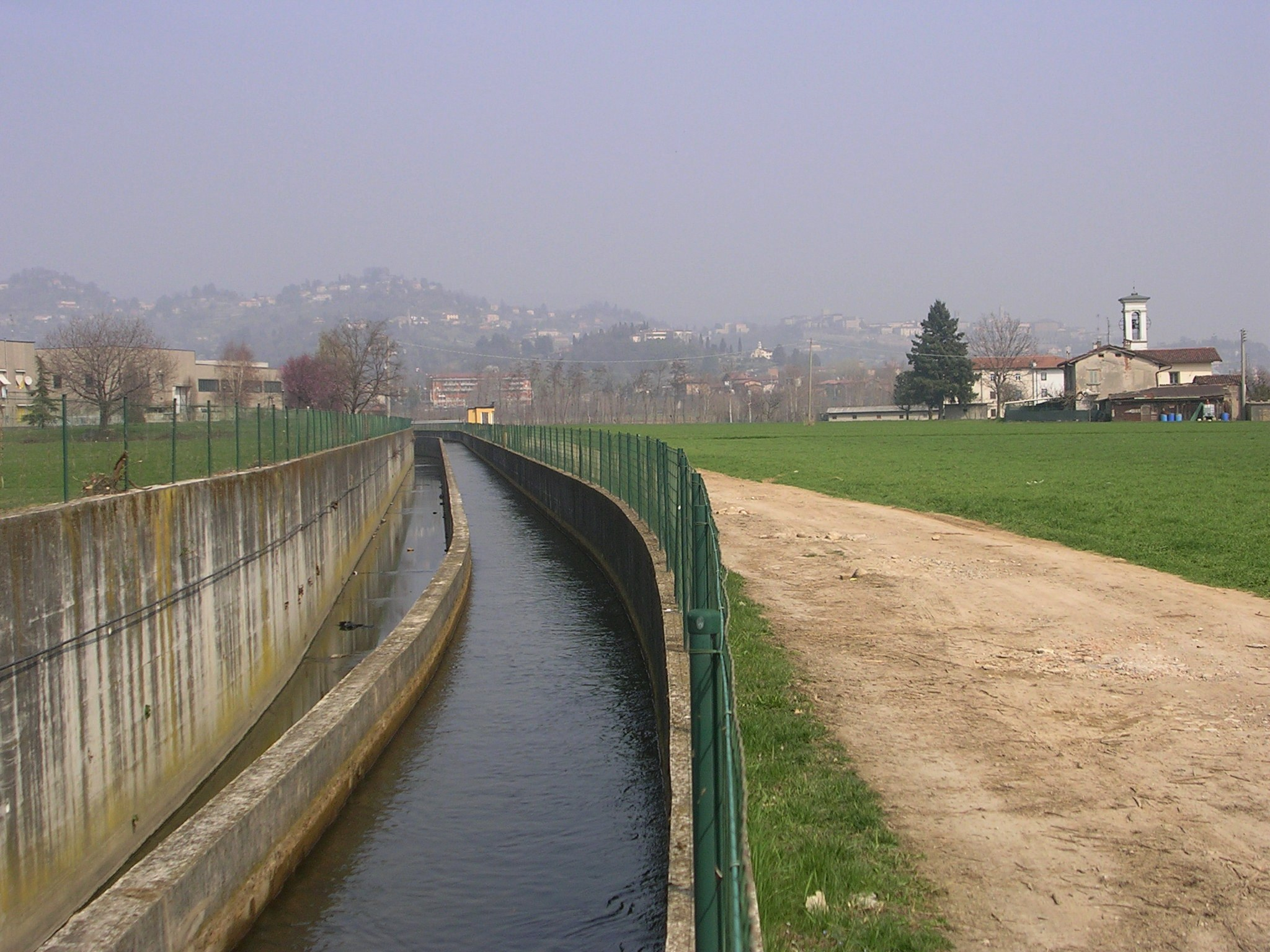 Roggia Serio Grande, tra Curno e Curnasco (fraz. di Treviolo) con chiesa di San Zenone, (Bergamo)